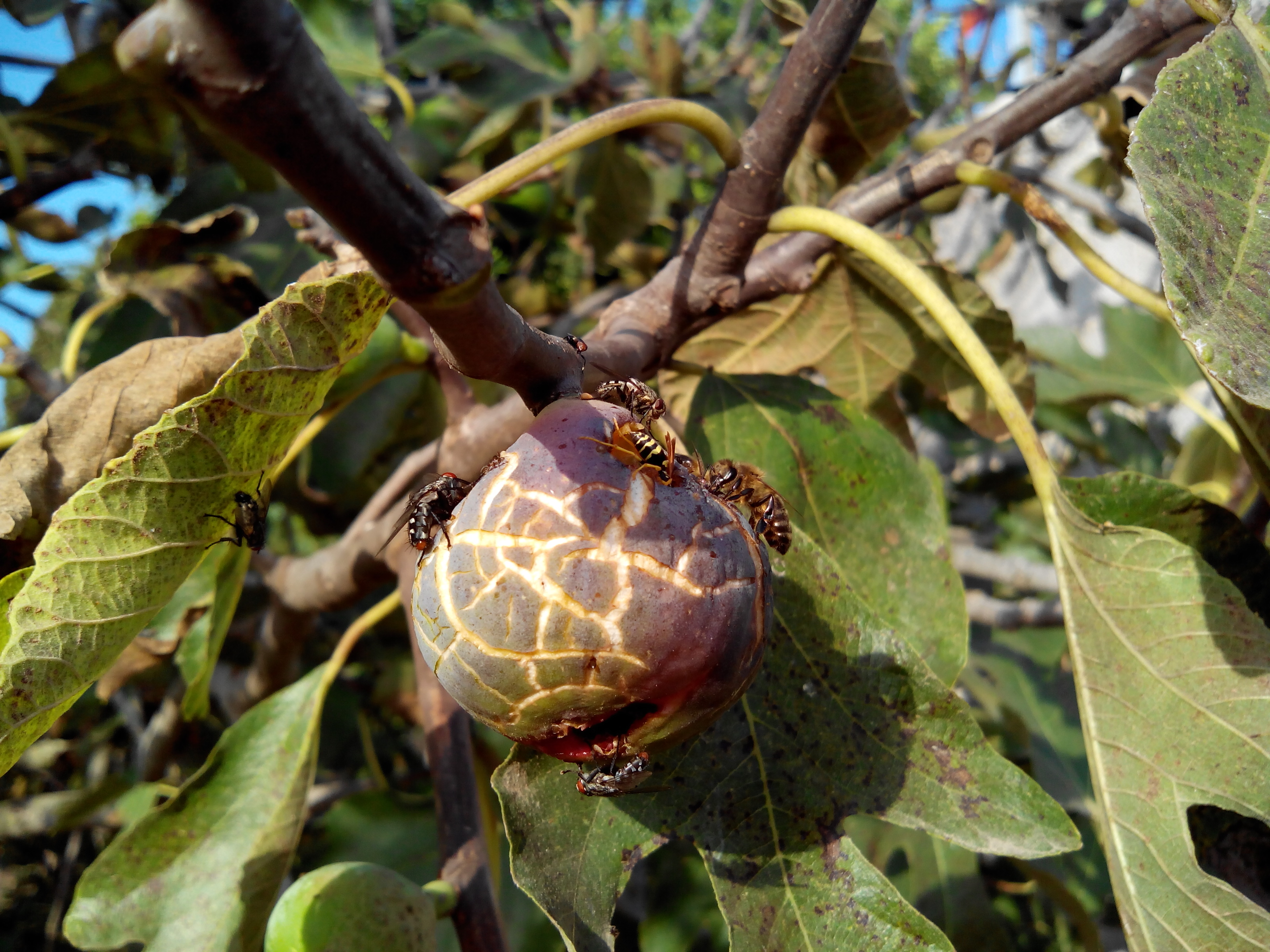 Coll de Dama